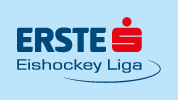 Logo